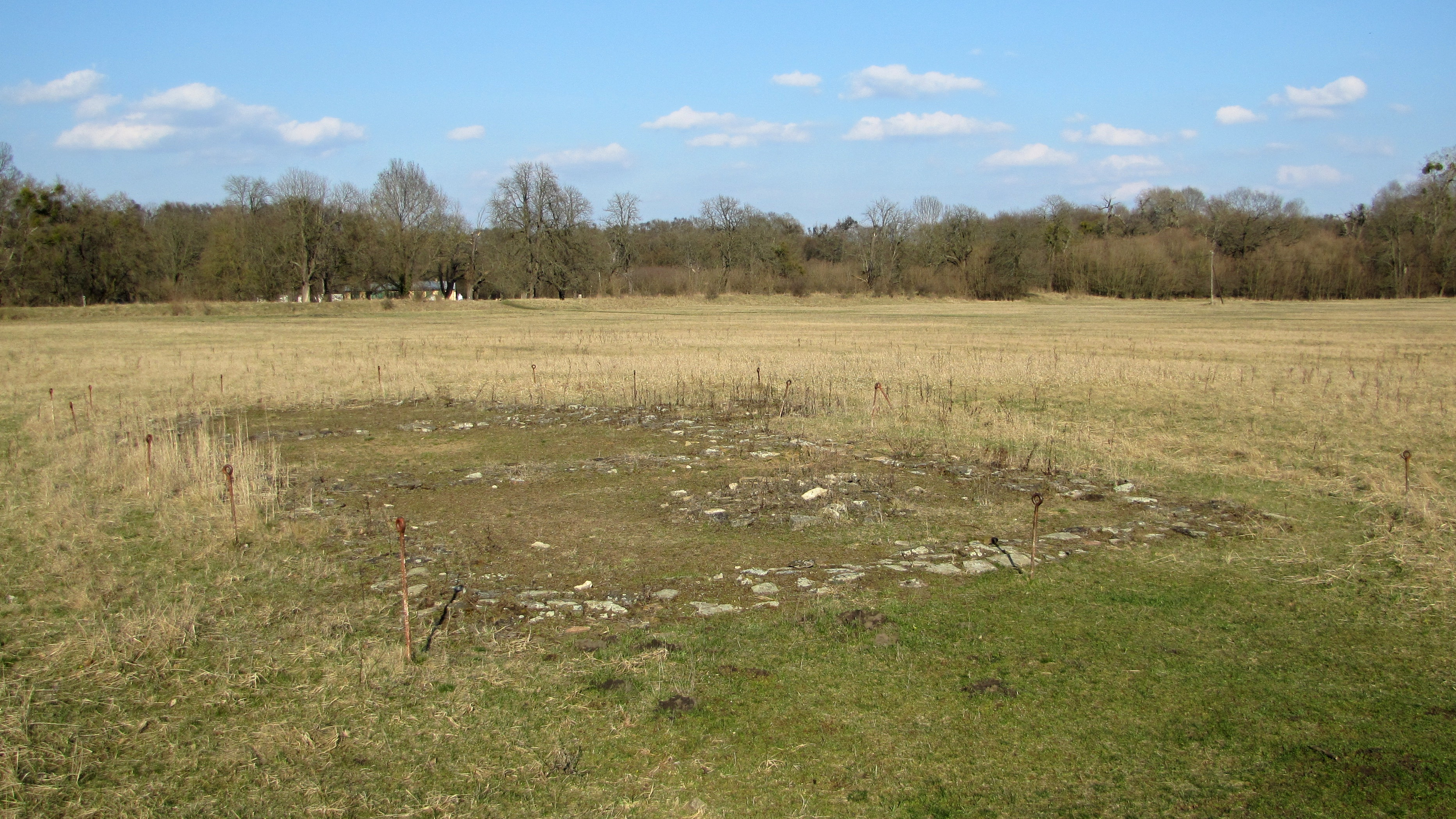 Bývalé hradiště Pohansko u Břeclavi – základy velkomoravského kostela